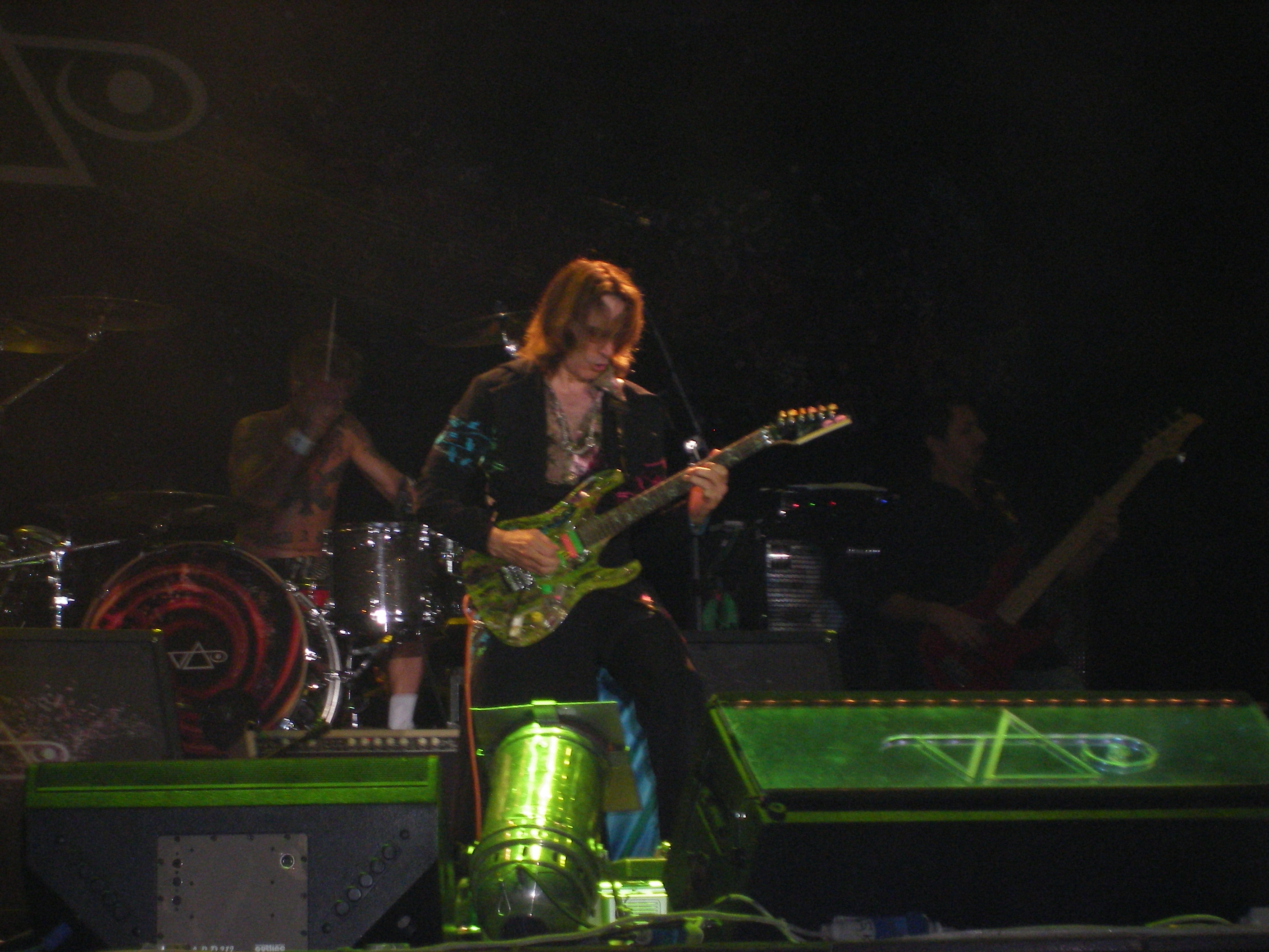 Steve Vai - Rome, Ippodromo Capannelle - #1